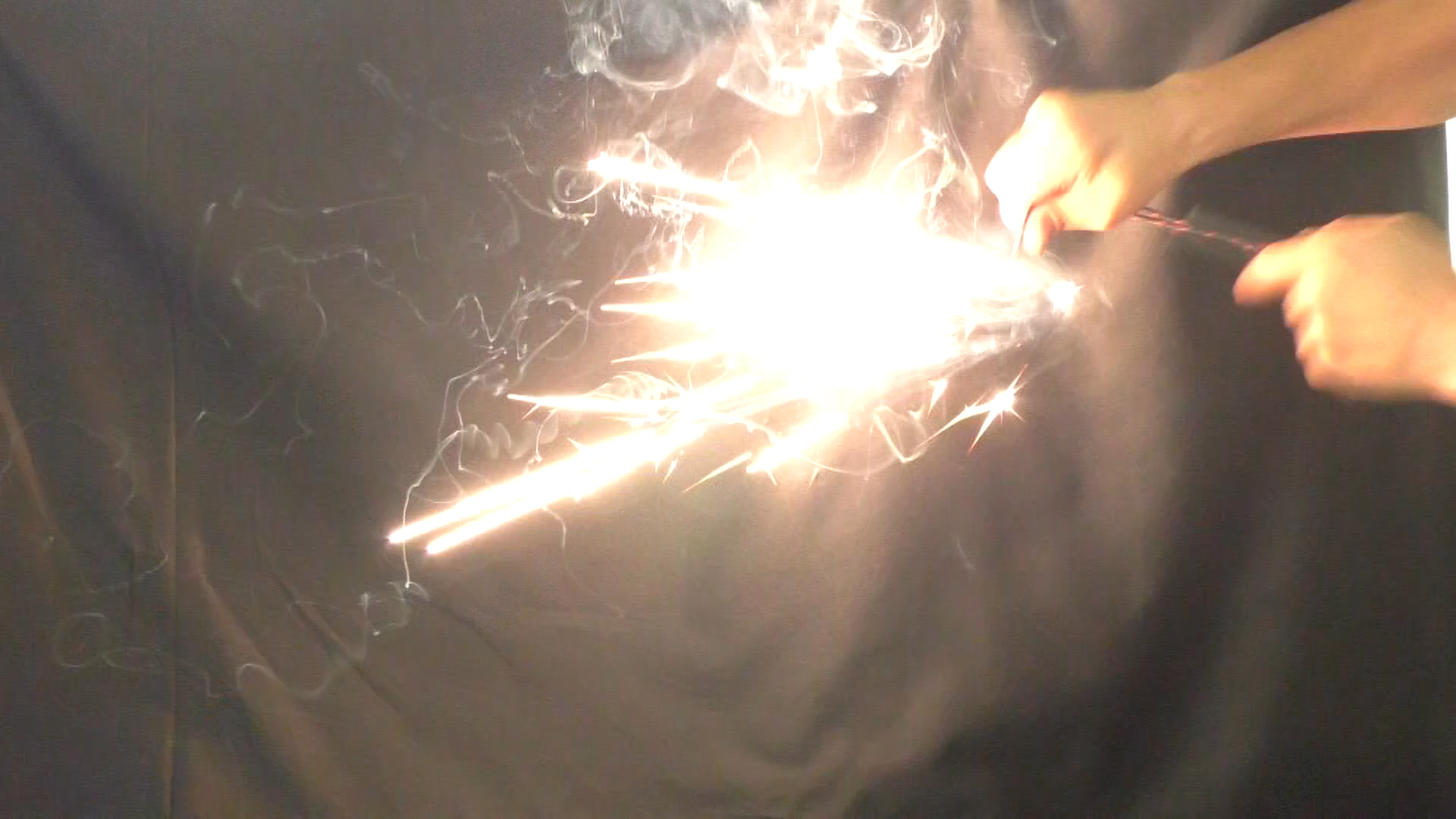 メタルマッチによる火花の例（ブッシュクラフト株式会社『ブッシュクラフト・ファイヤースチール』より）